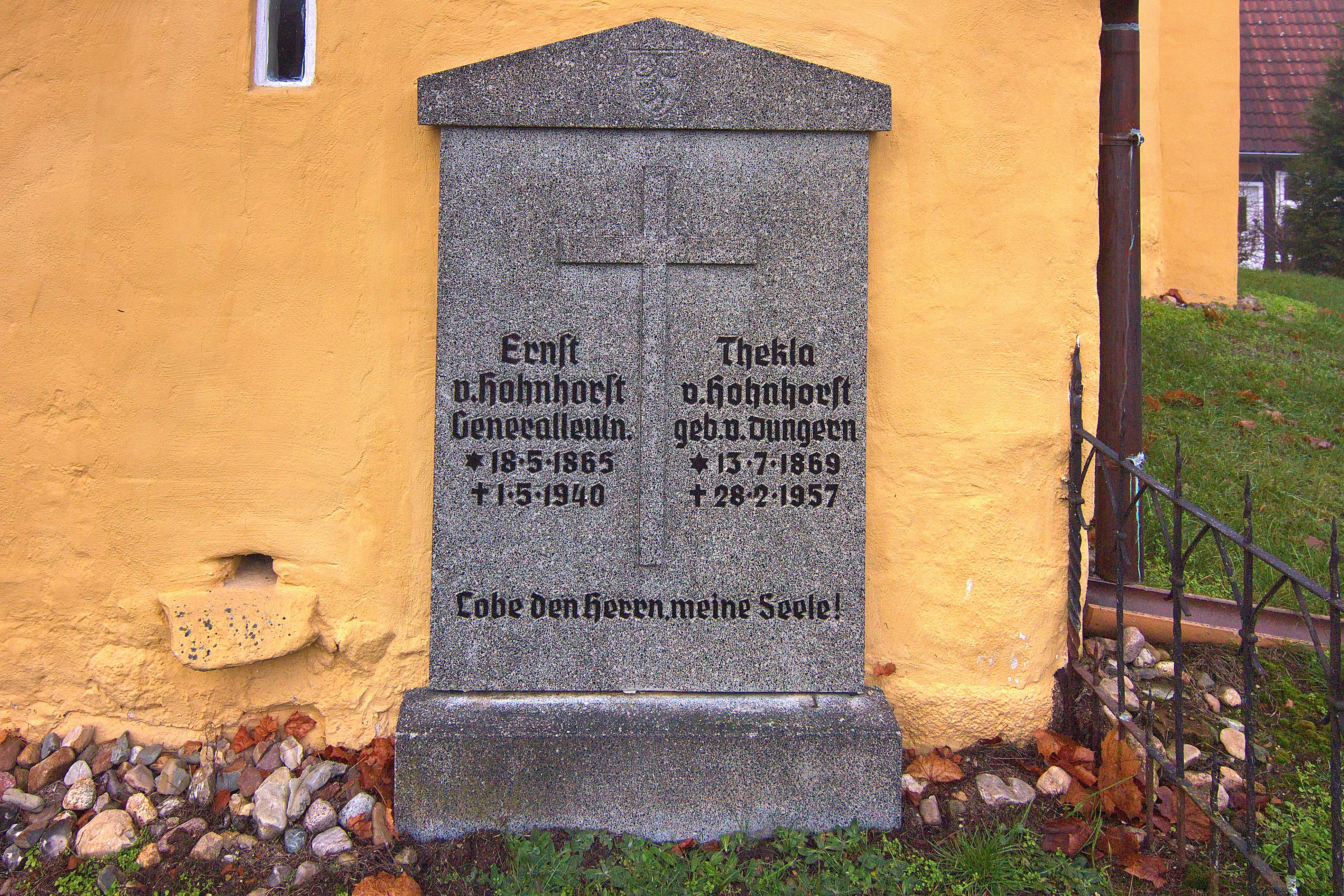 Kirche aus dem 14. Jahrhundert in Hohnhorst (Eldingen); Niedersachsen, Deutschland